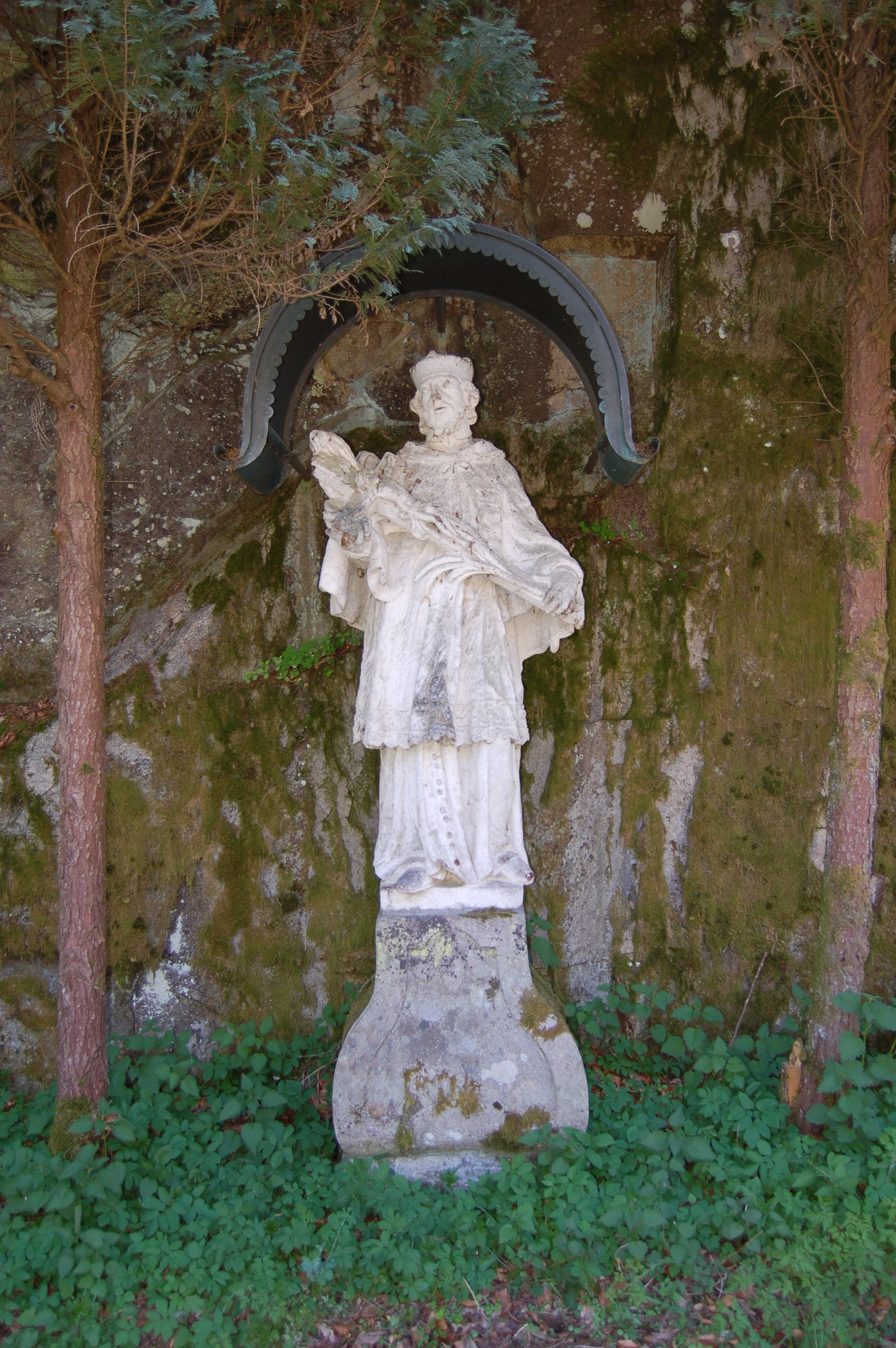 Der Figurenbildstock hl. Johannes Nepomuk befindet sich südlich der Kohnbrücke auf einem originalen Sockel. Die Mitte des 18. Jahrhunderts entstandene Figur befand sich ursprünglich im Schloss Langhalsen.